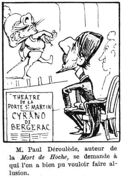 "Le mois comique, par Moloch".